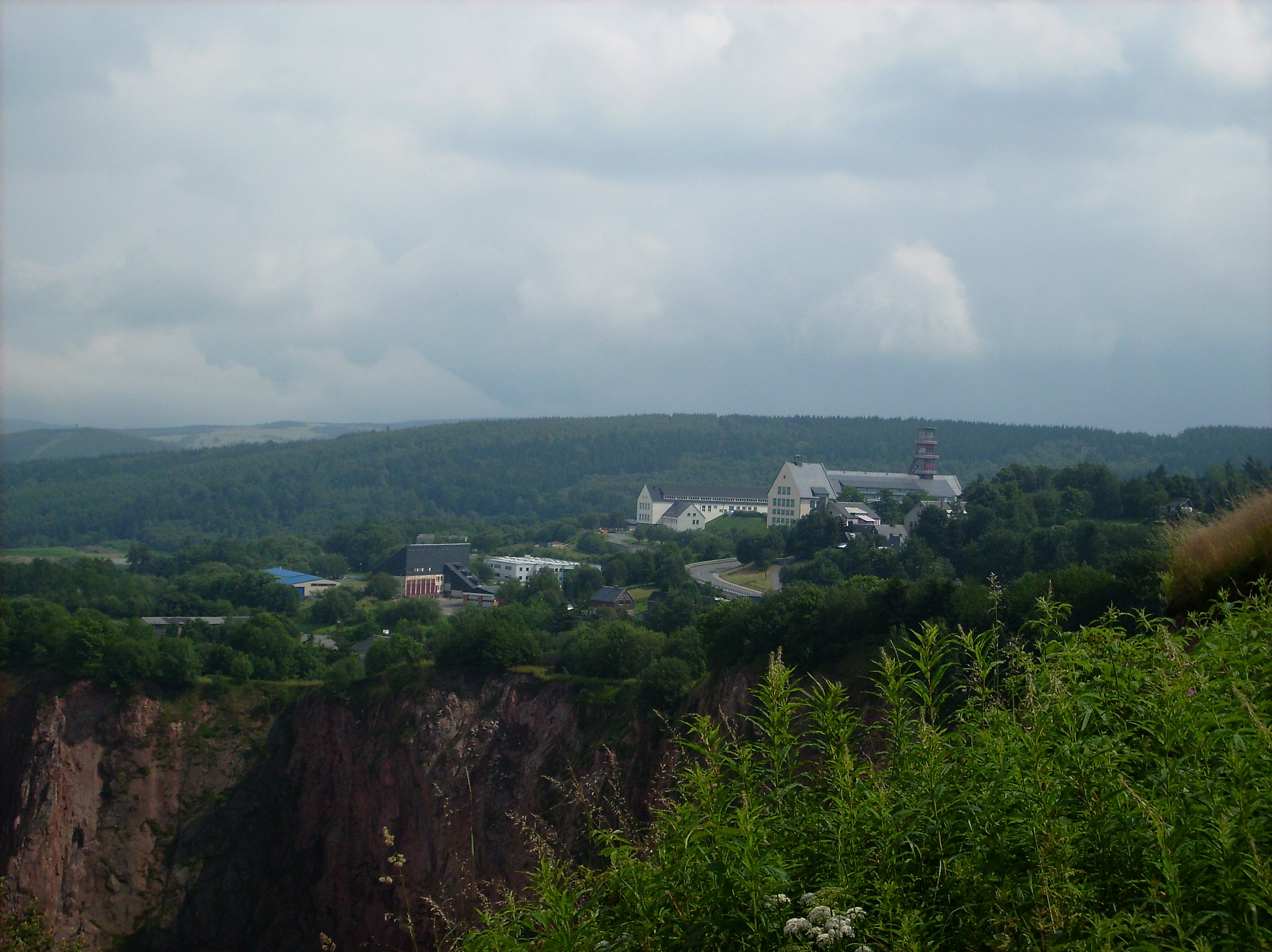 Blick über die Altenberger Binge zum ehemaligen Zinnbergwerk in Altenberg.